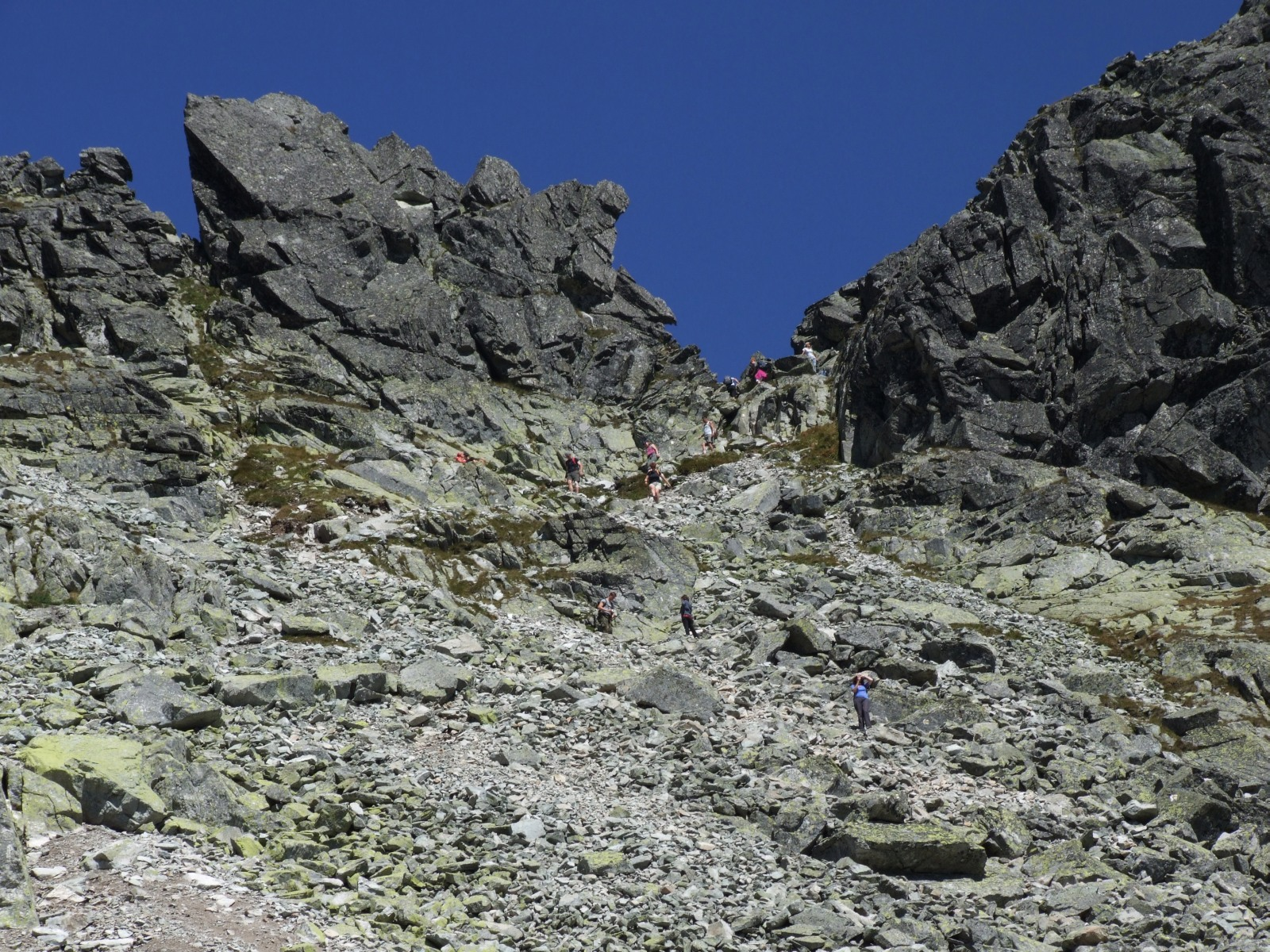 Bystra Ławka {Tatry Wysokie)